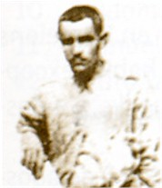 Marcos Mateo Conesa